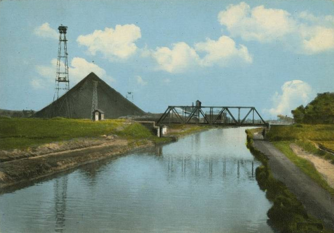 La Fosse n° 8 de la Compagnie des mines de l'Escarpelle était un charbonnage constitué d'un seul puits situé à Auby, Nord, Nord-Pas-de-Calais, France. L'image représente le terril n° 142, avant son exploitation.